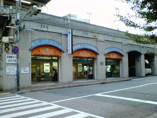 神姫バス三ノ宮バスターミナル、本人撮影 Category:神姫バスの画像] Category:神戸市中央区の画像